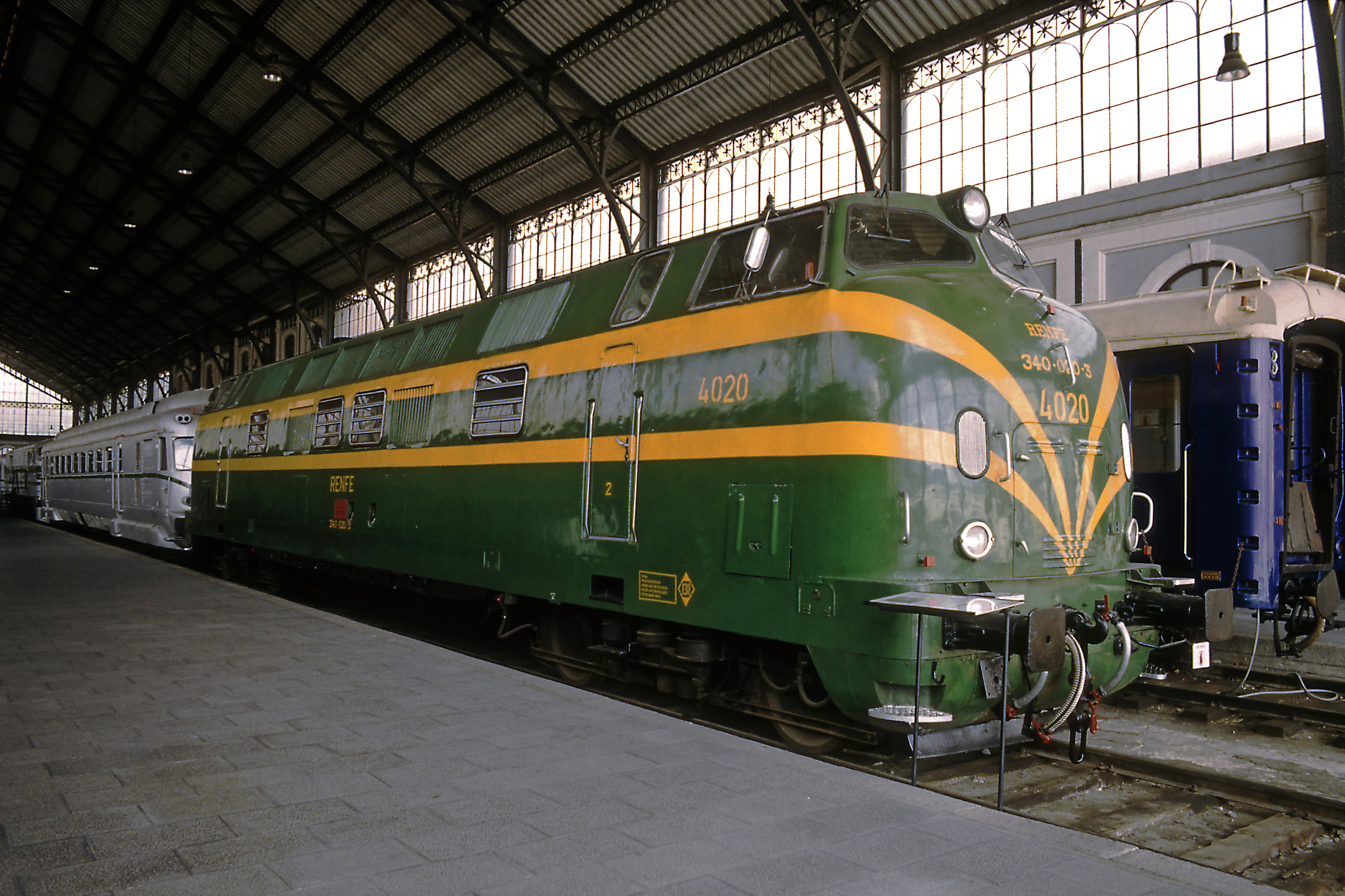 Eisenbahnmuseum Madrid Delicias, Renfe-BR 340 von Krauss.Maffei und Babcock & Wilcox, geliefert zwischen 1966 und 19690. Die Lok basiert technisch auf der Baureihe 221 der ehemaligen Deutschen Bundesbahn